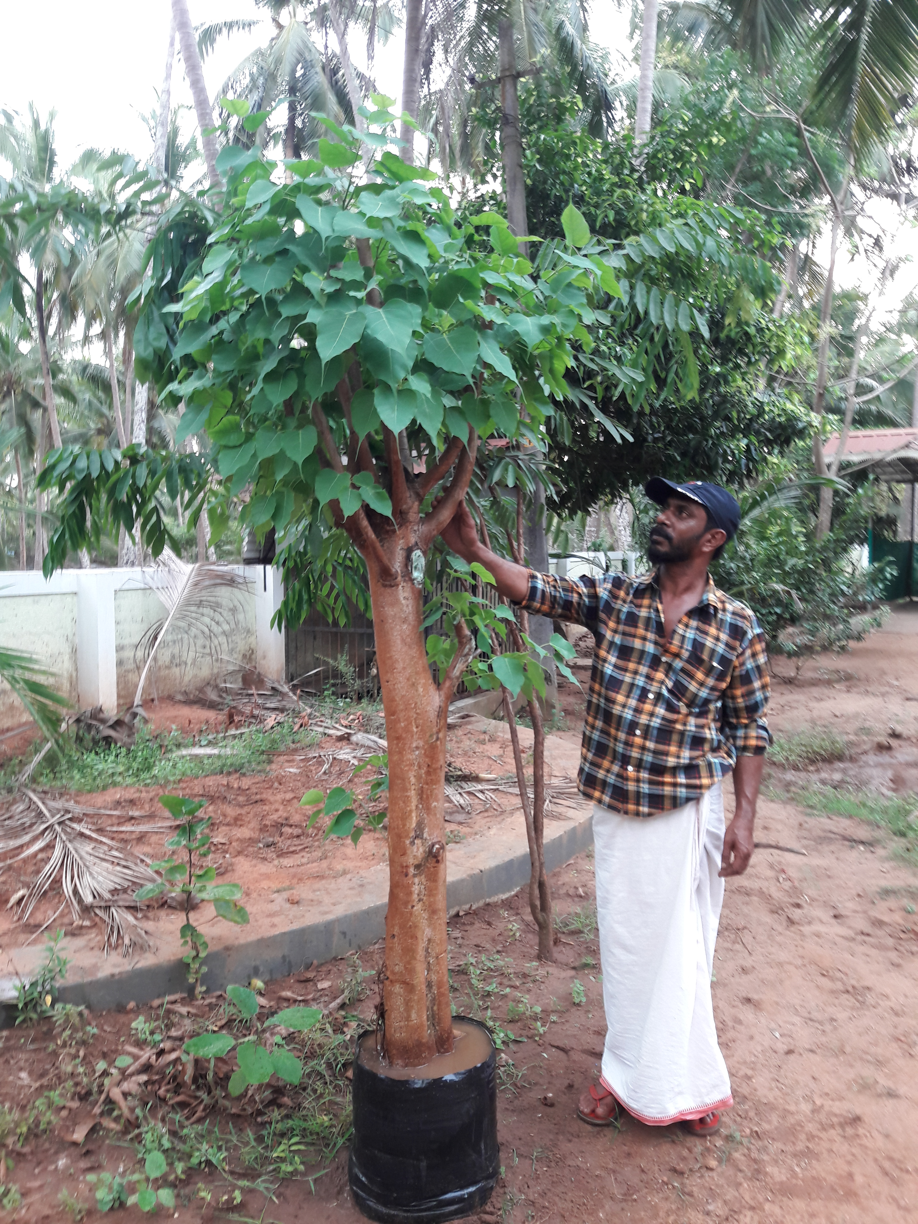 മലപ്പുറം ജില്ലയിലെ പൊന്നാനി താലൂക്കില്‍ വെളിയംകോട് സ്കൂള്‍ പടിയില്‍ പ്രവര്‍ത്തിക്കുന്ന പ്ലാന്‍റ് വില്ലേജ് ചാരിറ്റബിള്‍ സൊസൈറ്റി എന്ന നേച്ചര്‍ ക്ലബ് ഭാരവാഹി ഒരു അരയാല്‍ മരത്തോടൊപ്പം. .Peepal tree ശാസ്ത്രീയ നാമം Ficus religiosa കുടുംബം Moraceae.